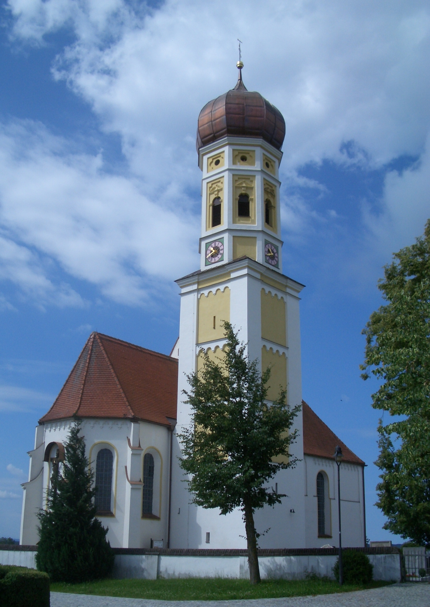 katholische Kirche St. Georg und Wendelin in Buchloe, Ortsteil Lindenberg